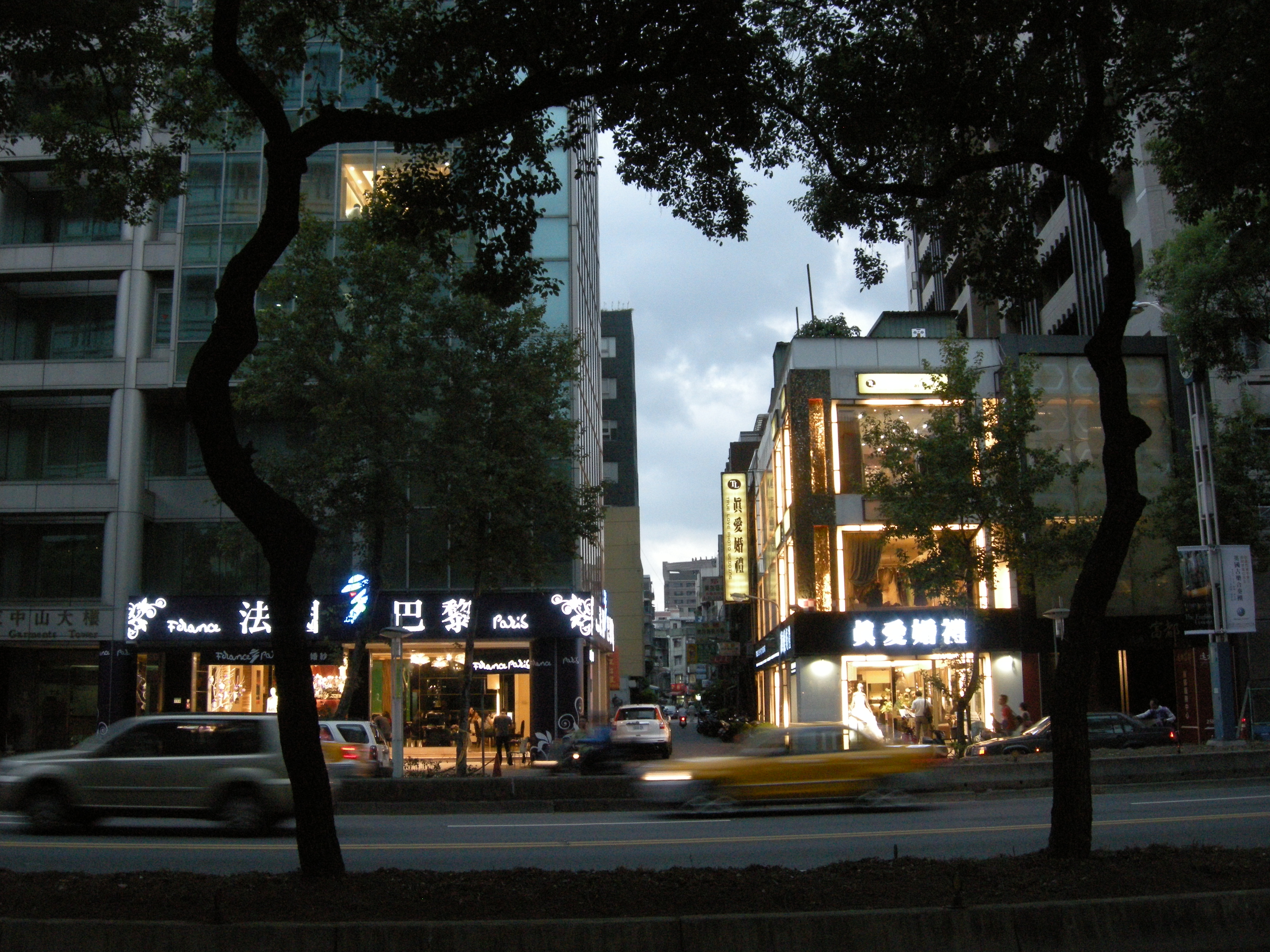 臺北市中山北路婚紗街。